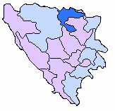 BosniaRegion Doboj